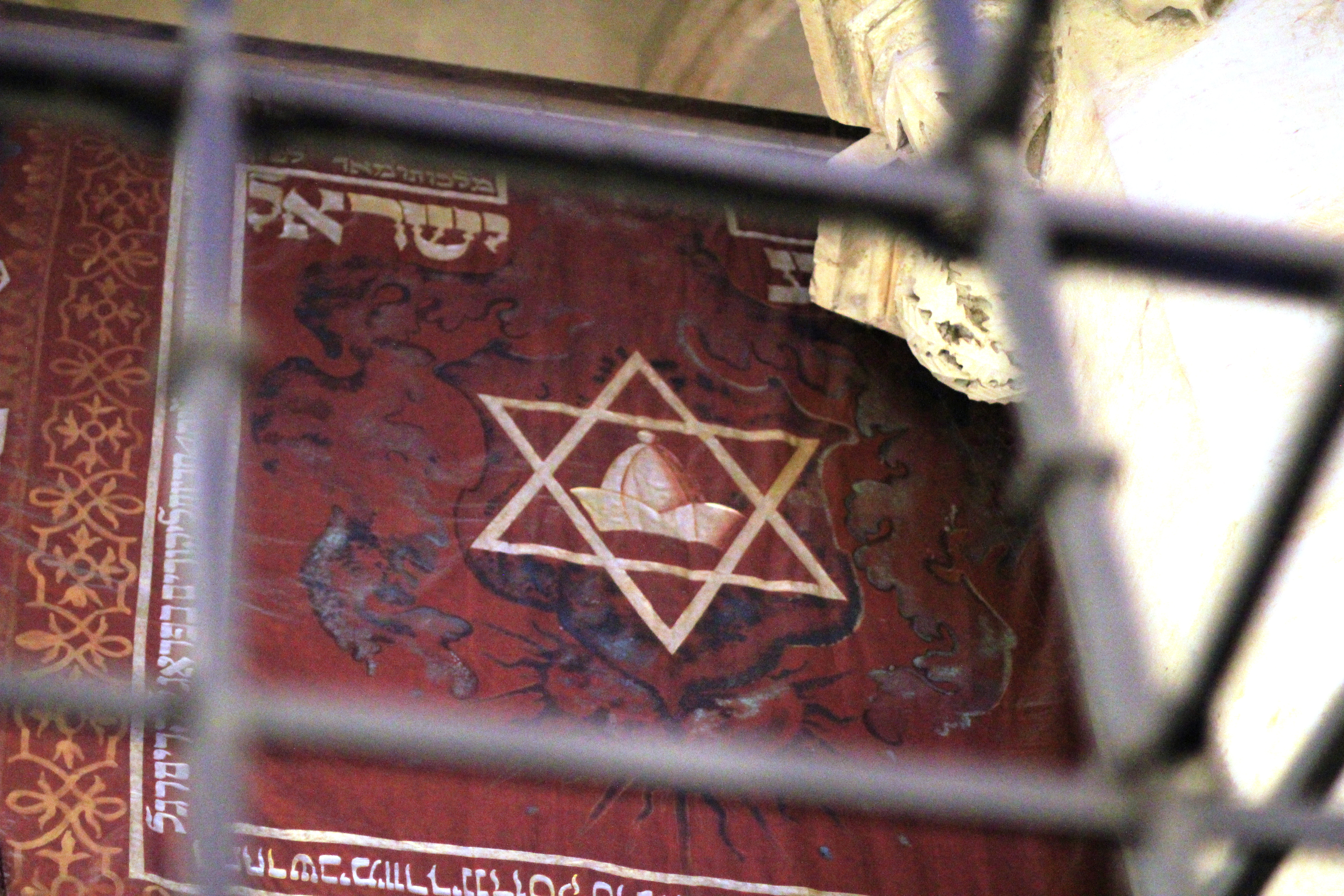 Den gammelnye synagogen i Josefov, Praha.